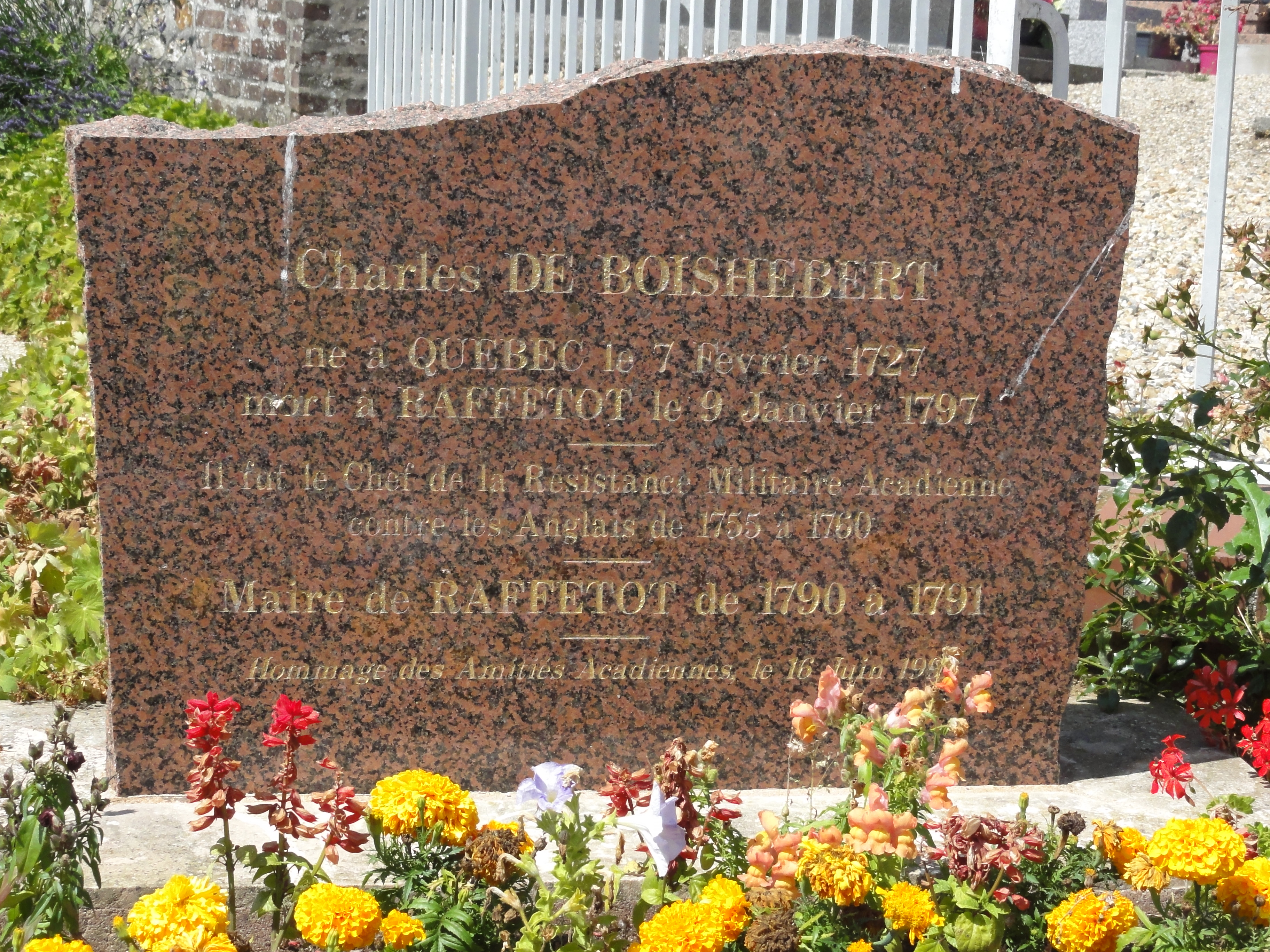 Raffetot (Seine-Mar.) mémorial Charles de Boishébert, maire et résistant